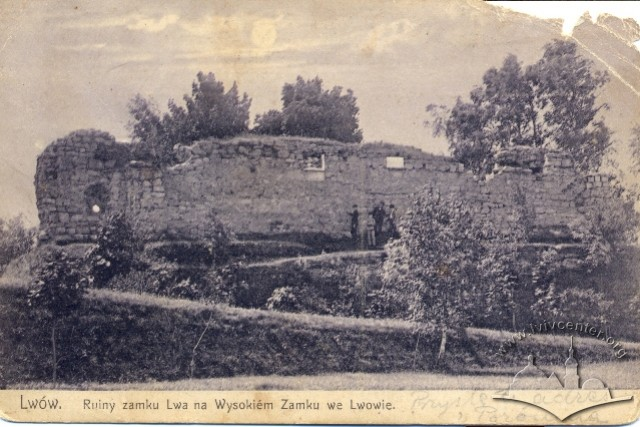 Високий замок, Львів, архівна світлина, ор. 1906-1916